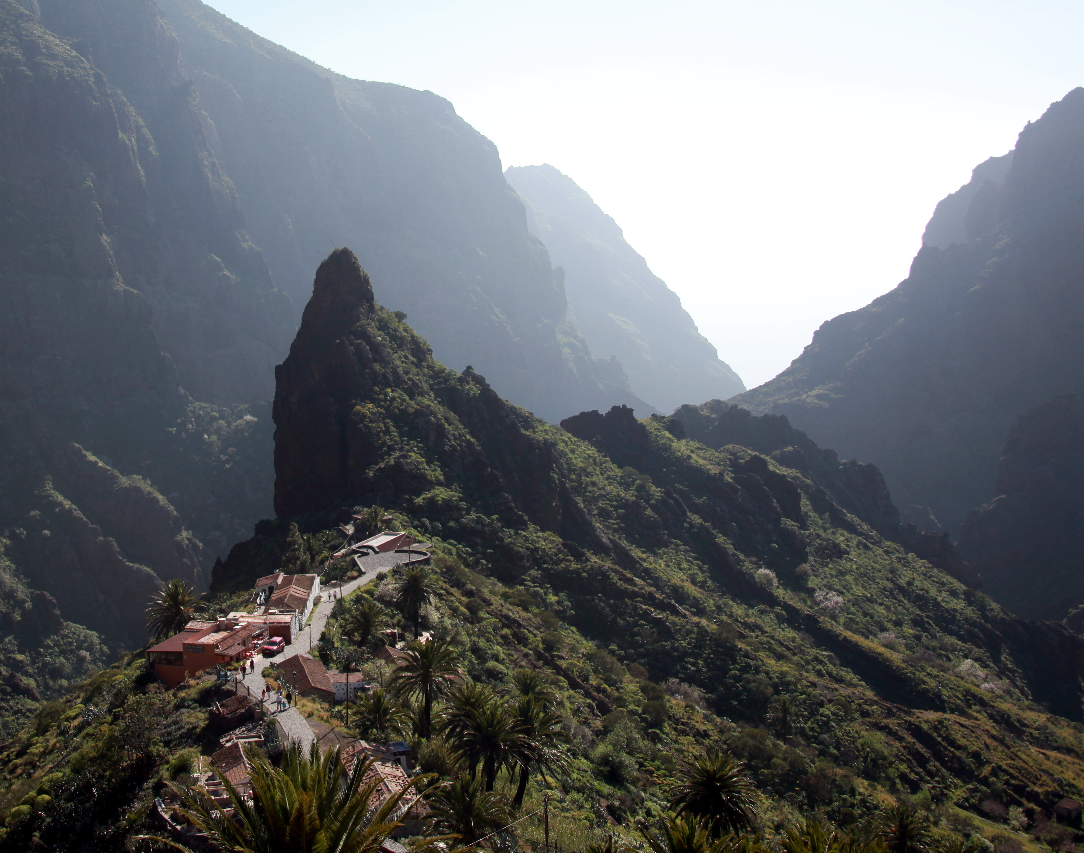 Vista de Masca